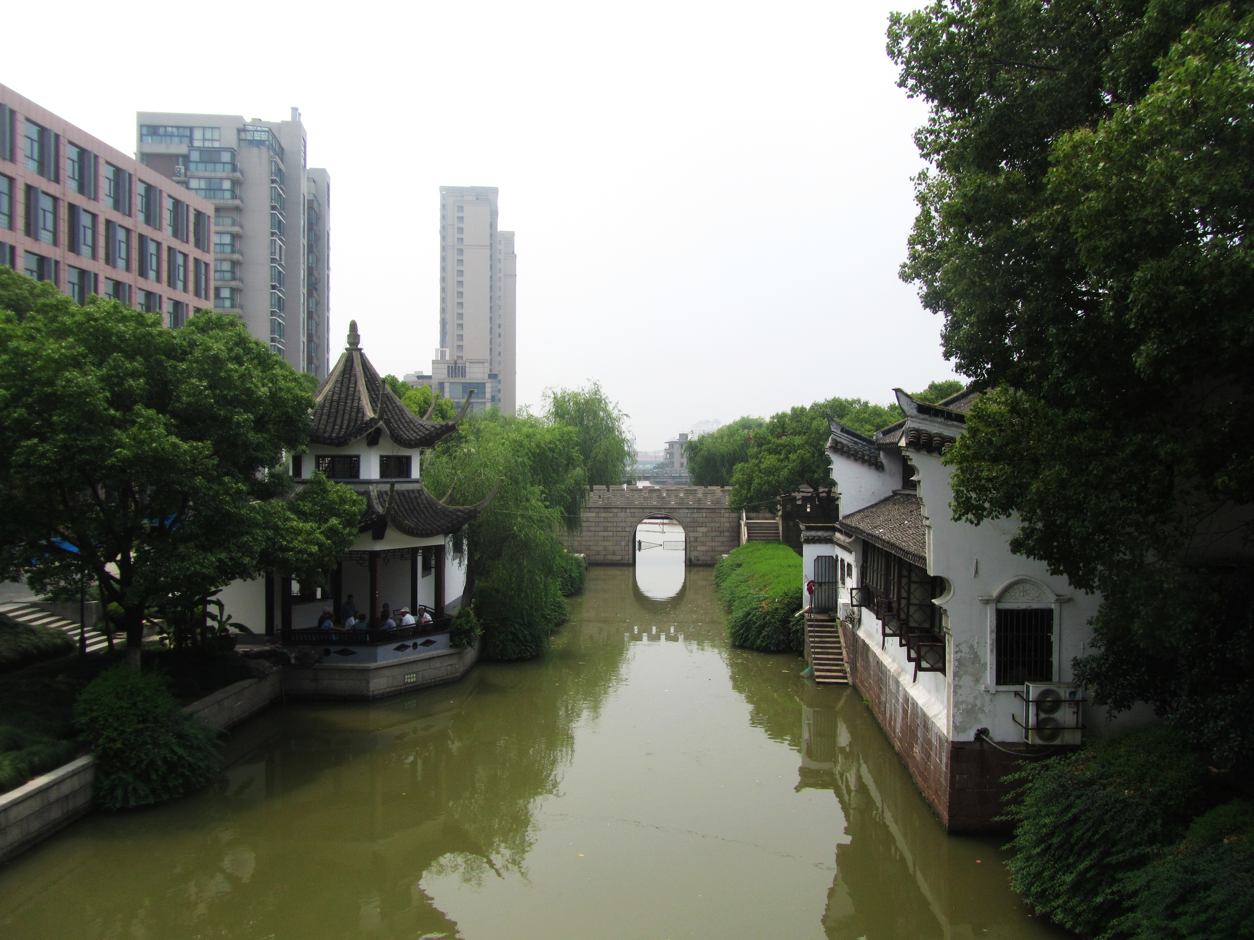 平湖市当湖第一桥，自桥上向西看水门（近年重建）。